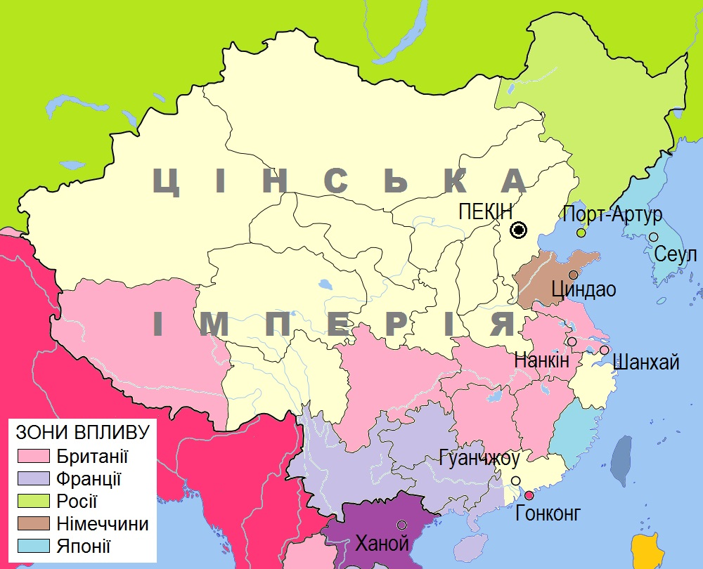 "Зони впливу" великих держав у Цінській імперії у 1901 році